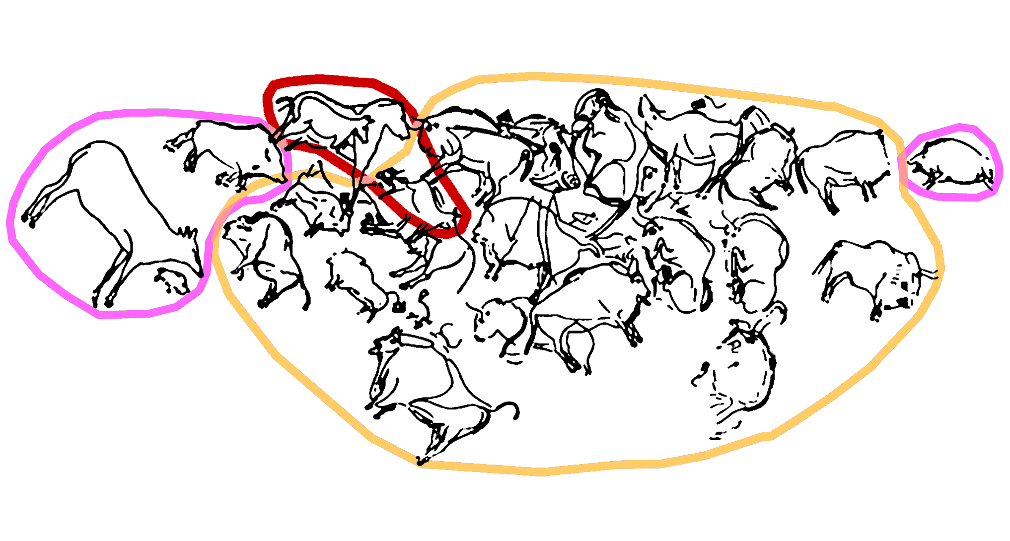 Asociación de animales en el gran panel de la Cueva de Altamira (Cantabria, España) según el paradigma de Leroi-Gourhan